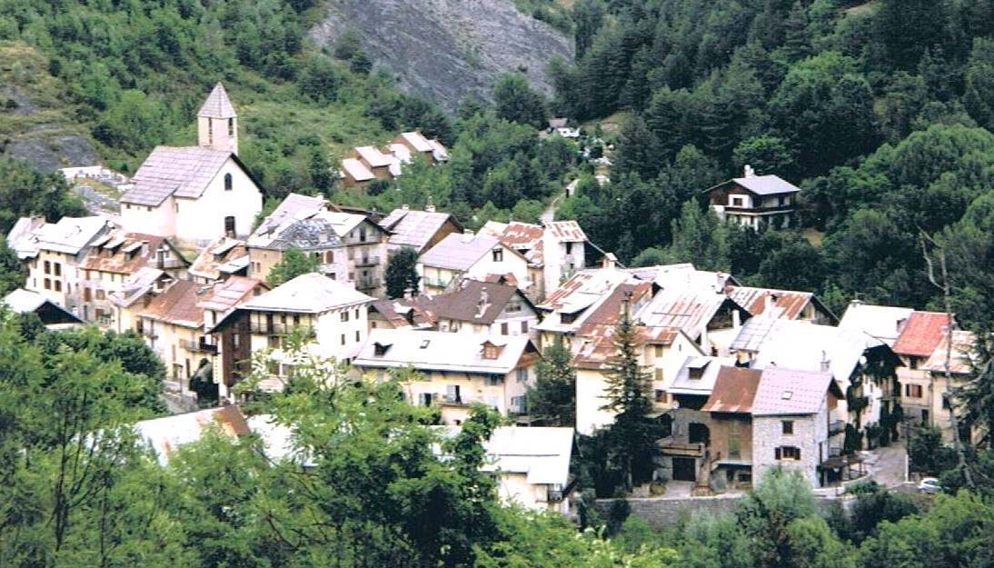 Village d'Entraunes, chef-lieu de la commune d'Entraunes aux sources du Var-Fleuve dans le département des Alpes maritimes (France)